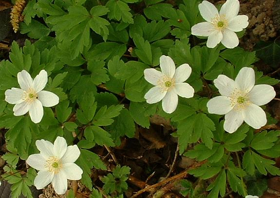 Anémone sylvie, photo J.F. Gaffard, Gy, Avril 2004, Licence GFDL